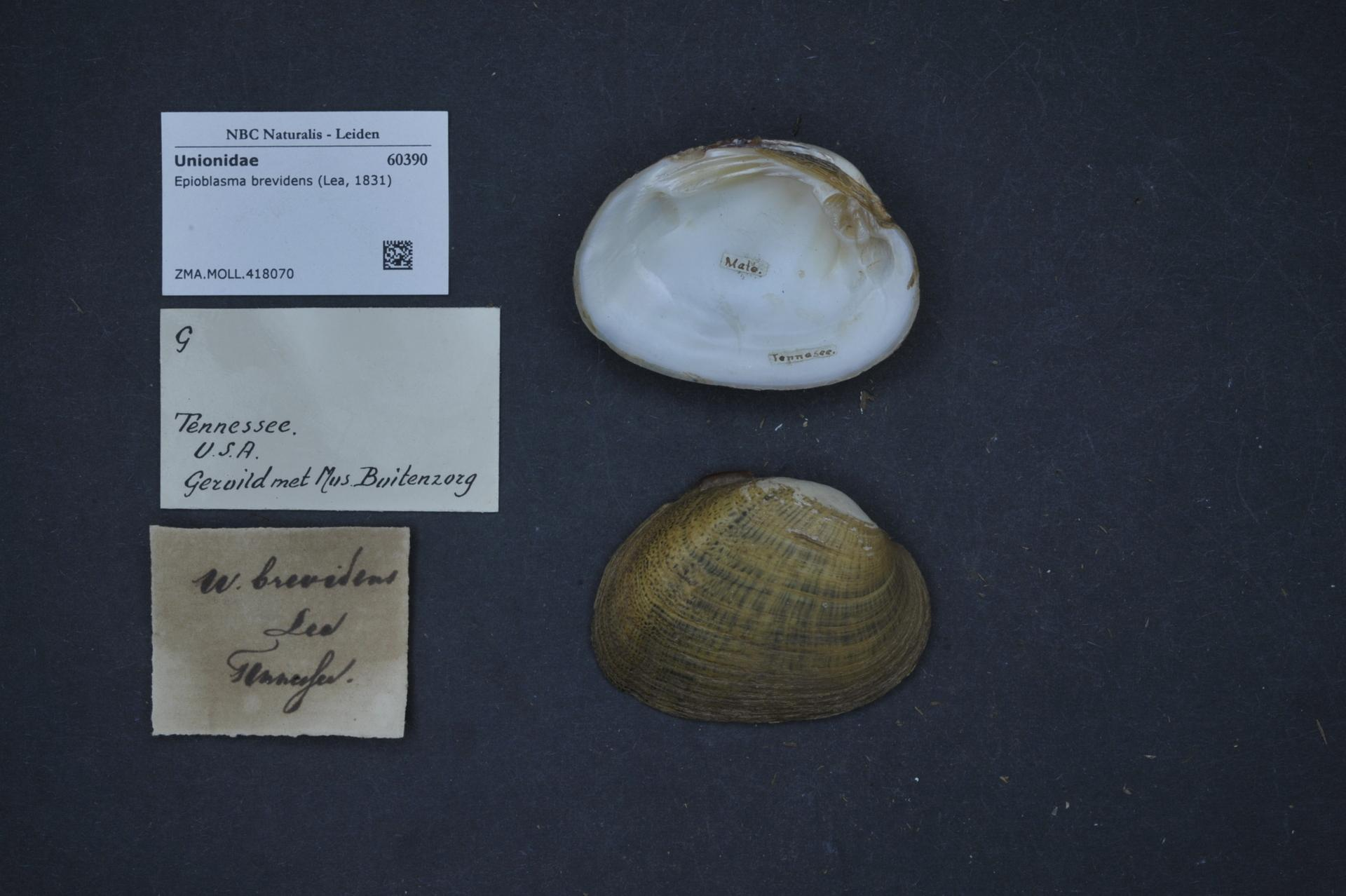 Epioblasma brevidens (Lea, 1831)